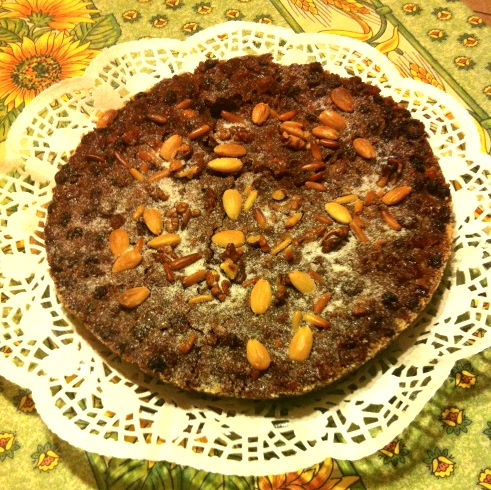 Il miacetto è un dolce natalizio tradizionale della città di Cattolica (Rimini)